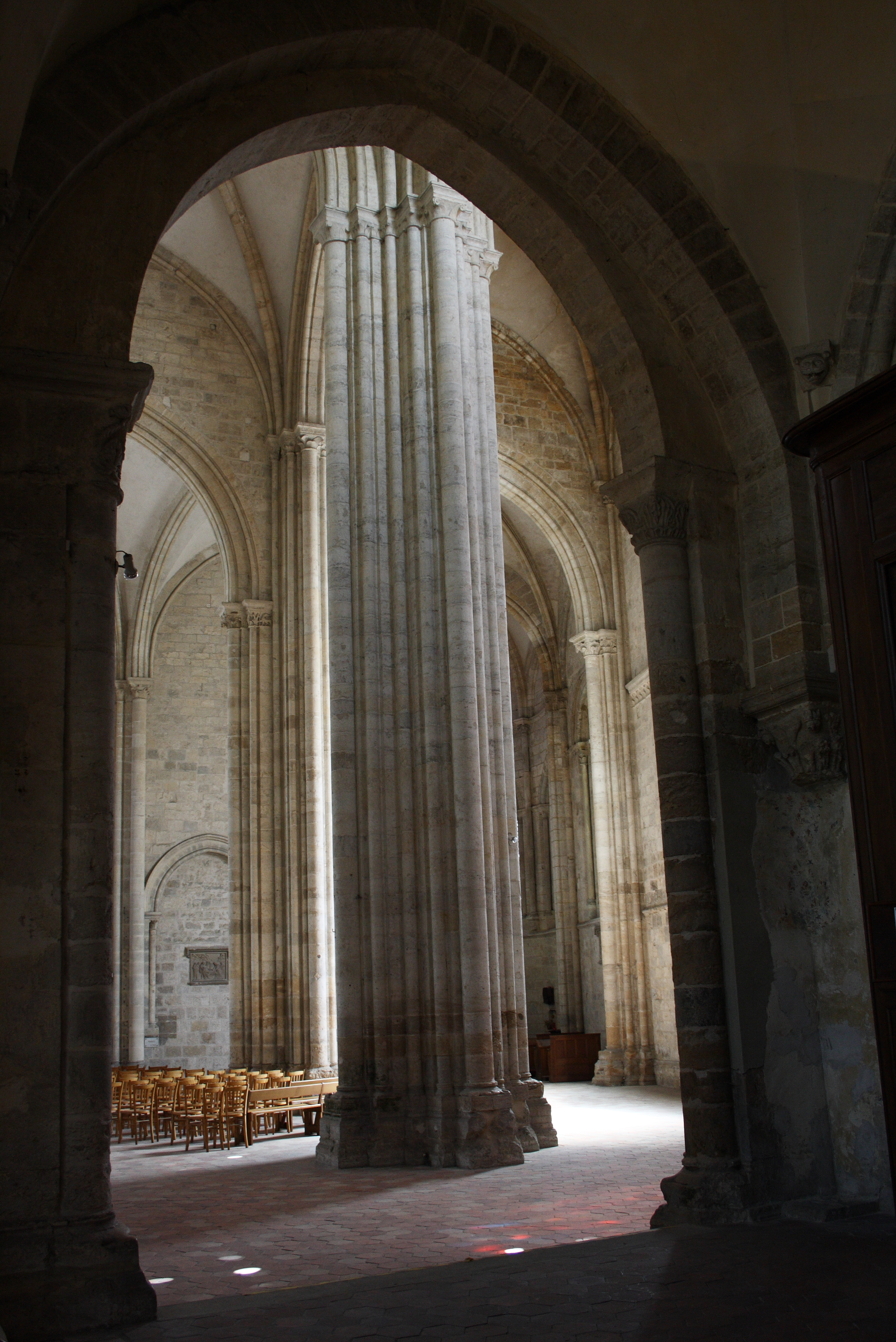 Katholische Pfarrkirche Notre-Dame-du-Fort in Étampes im Département Essonne in der Region Île-de-France (Frankreich), Säulenbündel Object location48° 26′ 05.89″ N, 2° 09′ 51.01″ E